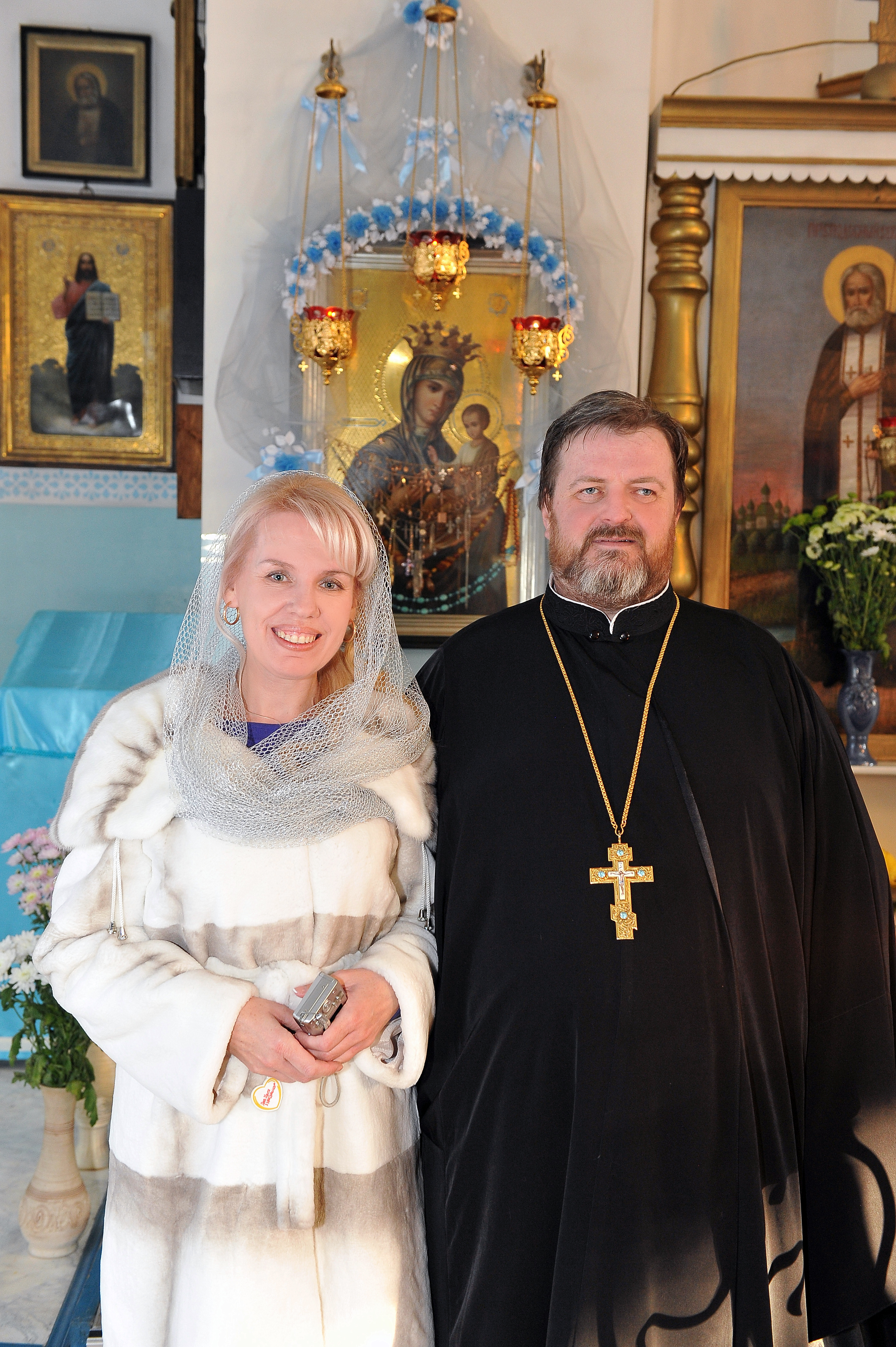 Возле иконы Божией Матери "Скоропослушница" (Свято-Николаевский морской собор Херсона)